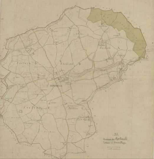 Plan du cadastre napoléonien de Montreuil-en-Touraine (révisé en 1934).